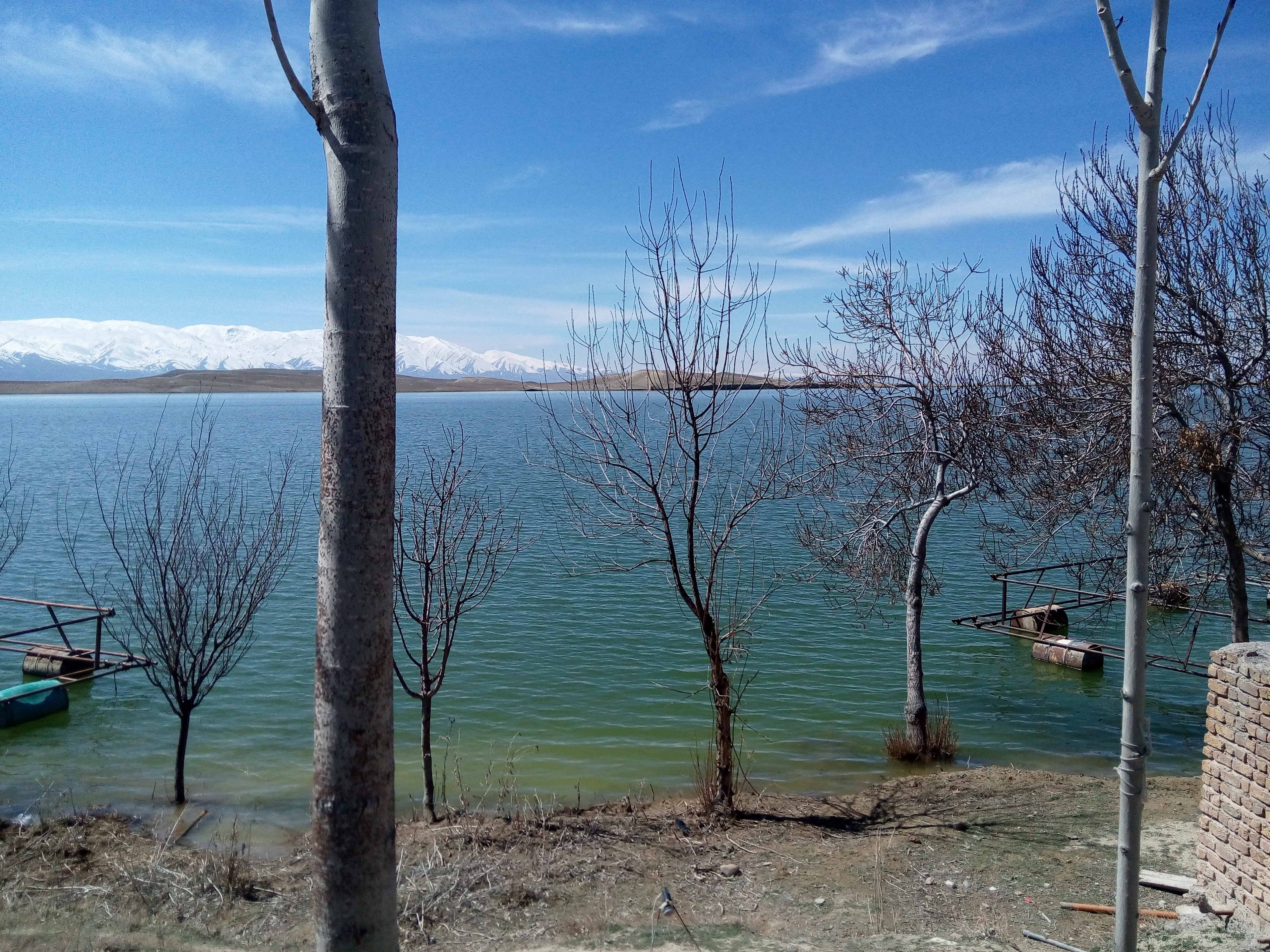 عید نوروز 94